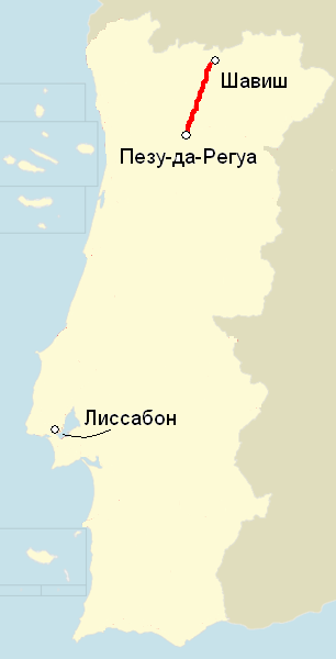 Mapa de localização do Linha do Corgo em Portugal (inscrições na língua russa)